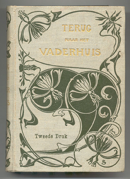 Boekomslag: Terug naar het vaderhuis. 2e druk 1903. Auteur: -. Bandontwerp: A. Sipkema. Uitgeverij: Egeling